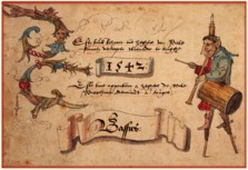 Detail van een gedateerd blad van het liedboek (1542) van de Brugse koopman Zeghere van Male (Bibliotheek van Kamerijk).